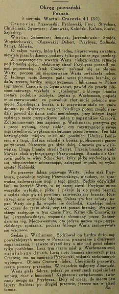 Przegląd sportowy z dnia 07 sierpnia 1924 - Mecz z dnia 3 sierpnia 1924 Warta Poznań - Cracovia (4:1) - Sędzia Wachsmann